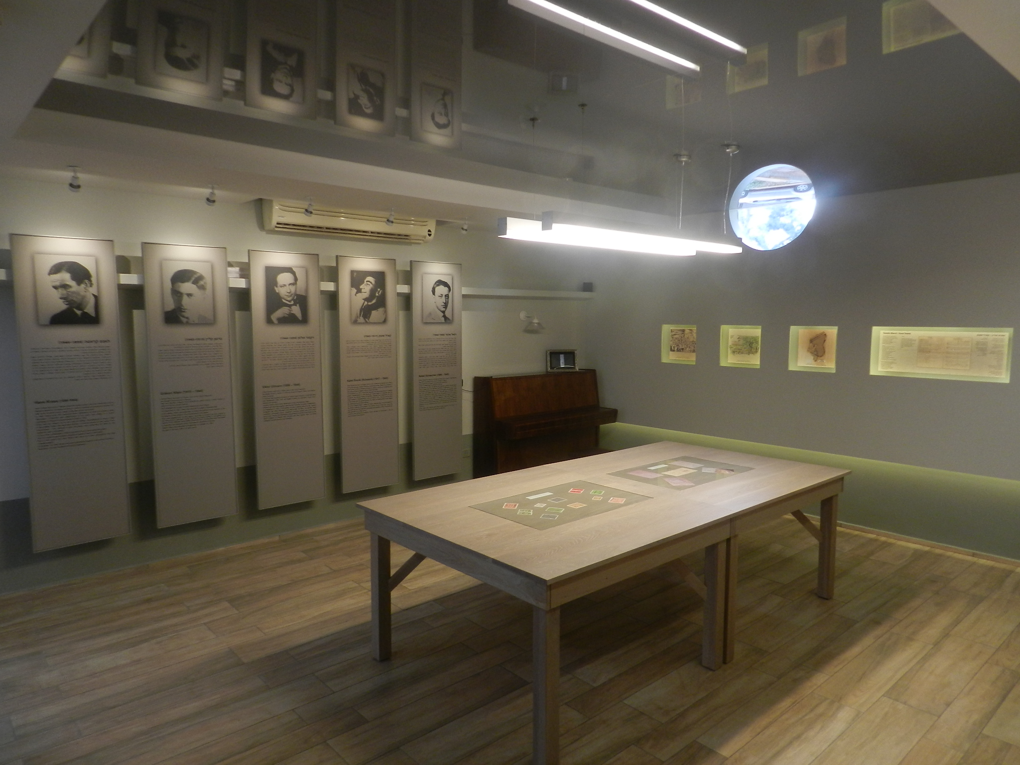 הספריה וחדר הזכרון למוזיקאים של גטו טרזינשטט